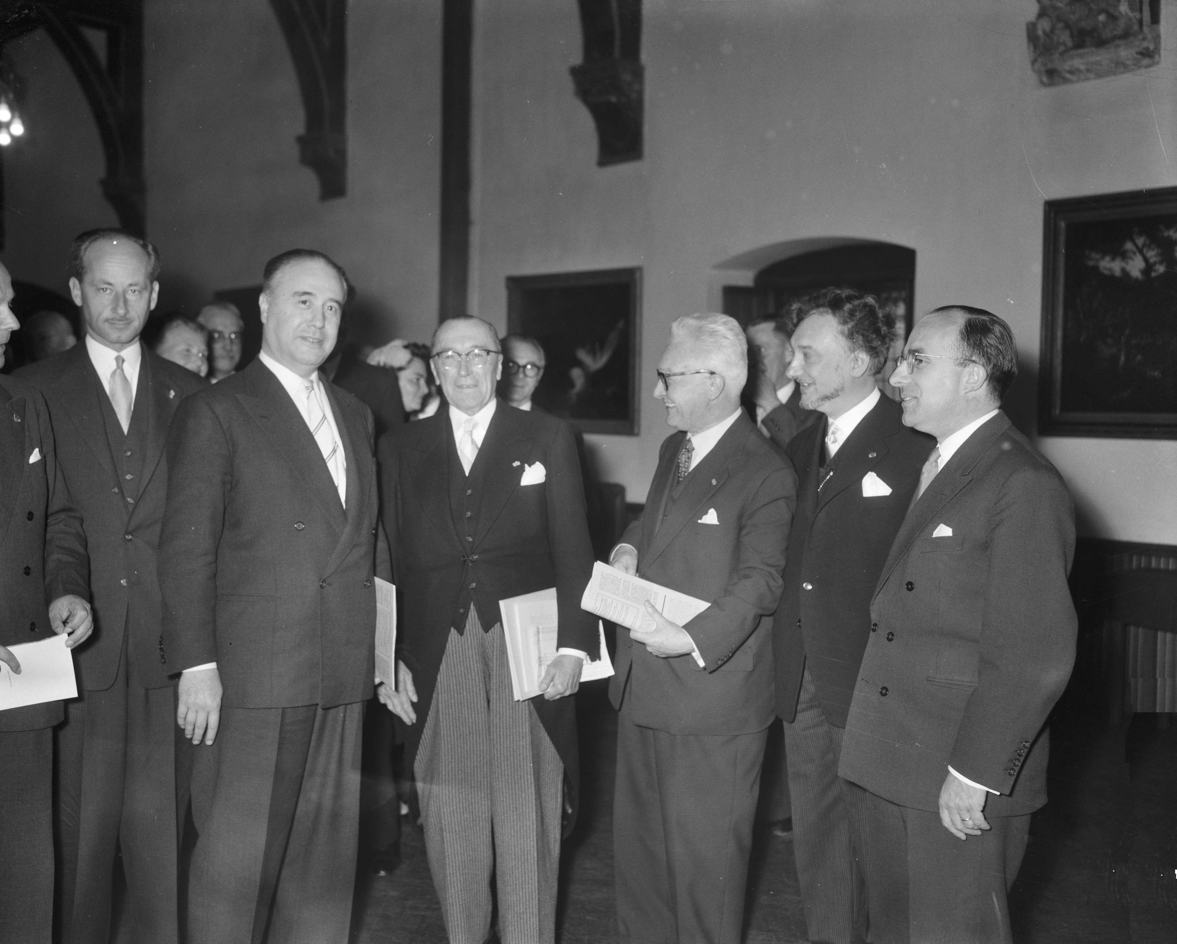 Prijs der Nederlandse Letteren voor Herman Teirlinck (Belgie). Ridderzaal. V.l.n.r.: dhr X, Leo Collard minister van onderwijs Belgie, Herman Teirlinck, Julien Kuypers, dhr Y. min. Cals. Datum: 27 oktober 1956